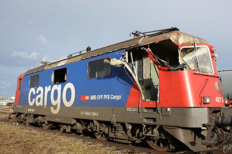 In der Nacht auf den 14. Januar 2015 wurde im Containerterminal im Hauptbahnhof Hof die Lokomotive Re 421 383 von einem Reach-Stacker seitlich aufgeschlitzt. Der Greifarm des abgestellten Reach-Stackers ragte noch in das Profil des Containerzugs, der mit einer Diesellokomotive aus einem Gleis gezogen wurde.